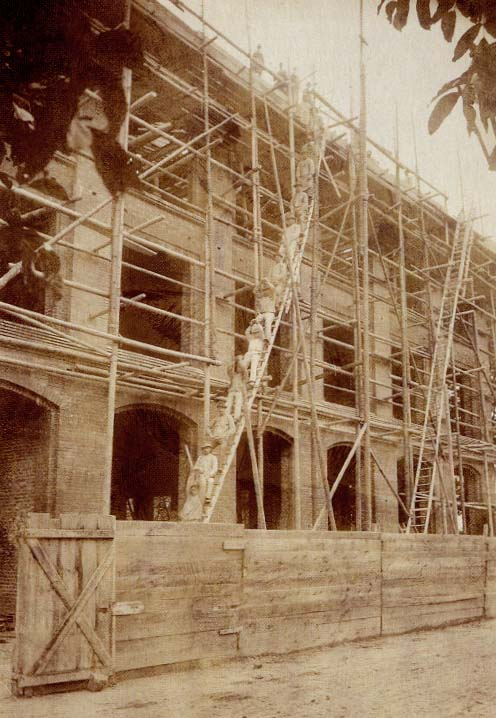 Neubau des Hauptgebäudes der Fa. Gebr. Klingenberg an der Hornschen Straße in Detmold